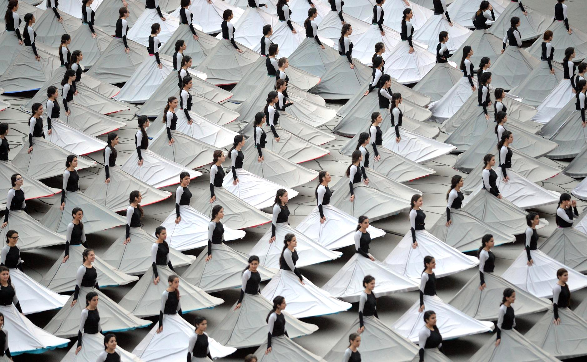 Церемония открытия Первых Европейских игр в Баку